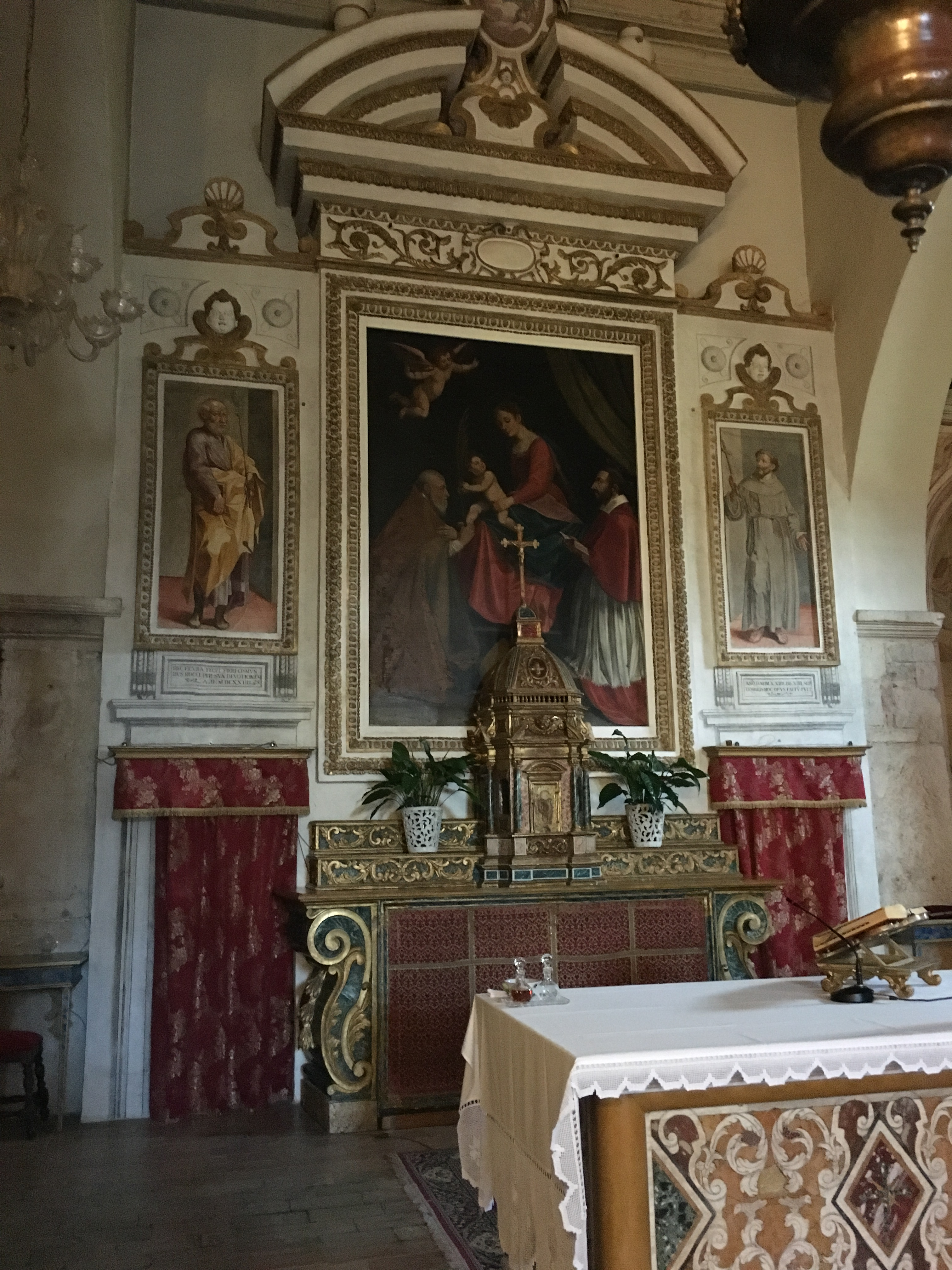 San Sabino Spoleto. Presbiterio rialzato